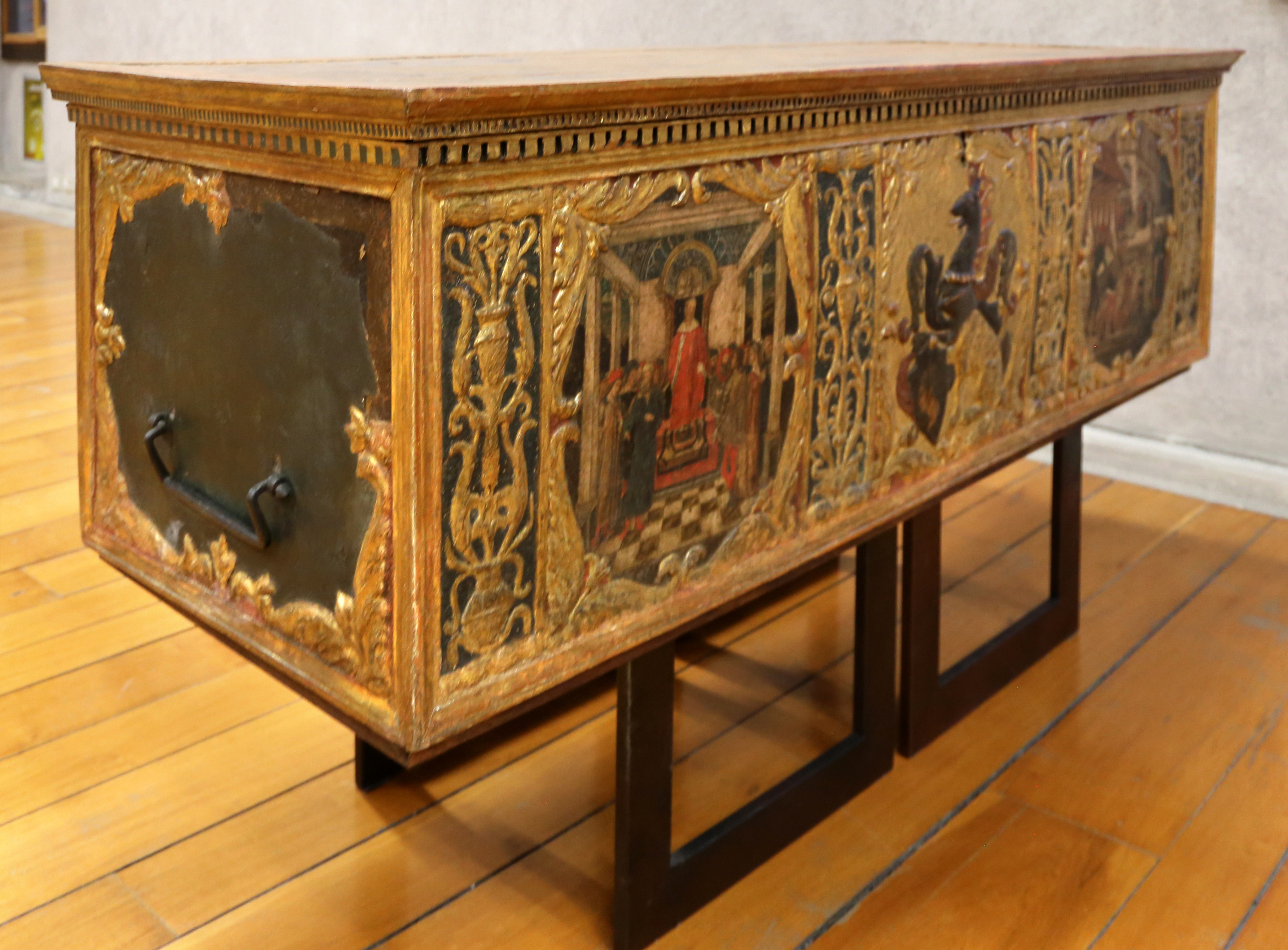 Museo di Castelvecchio This is a photo of a monument which is part of cultural heritage of Italy.